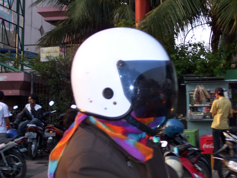 Bike rider helmet